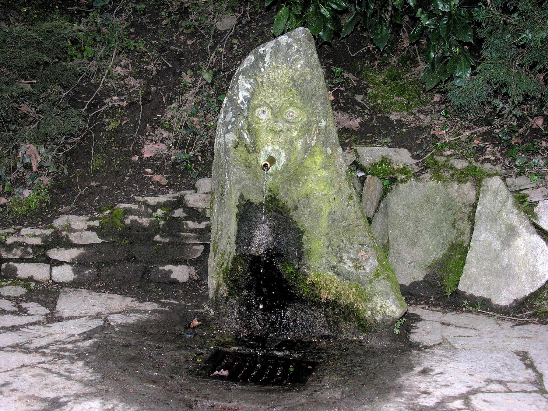 self made